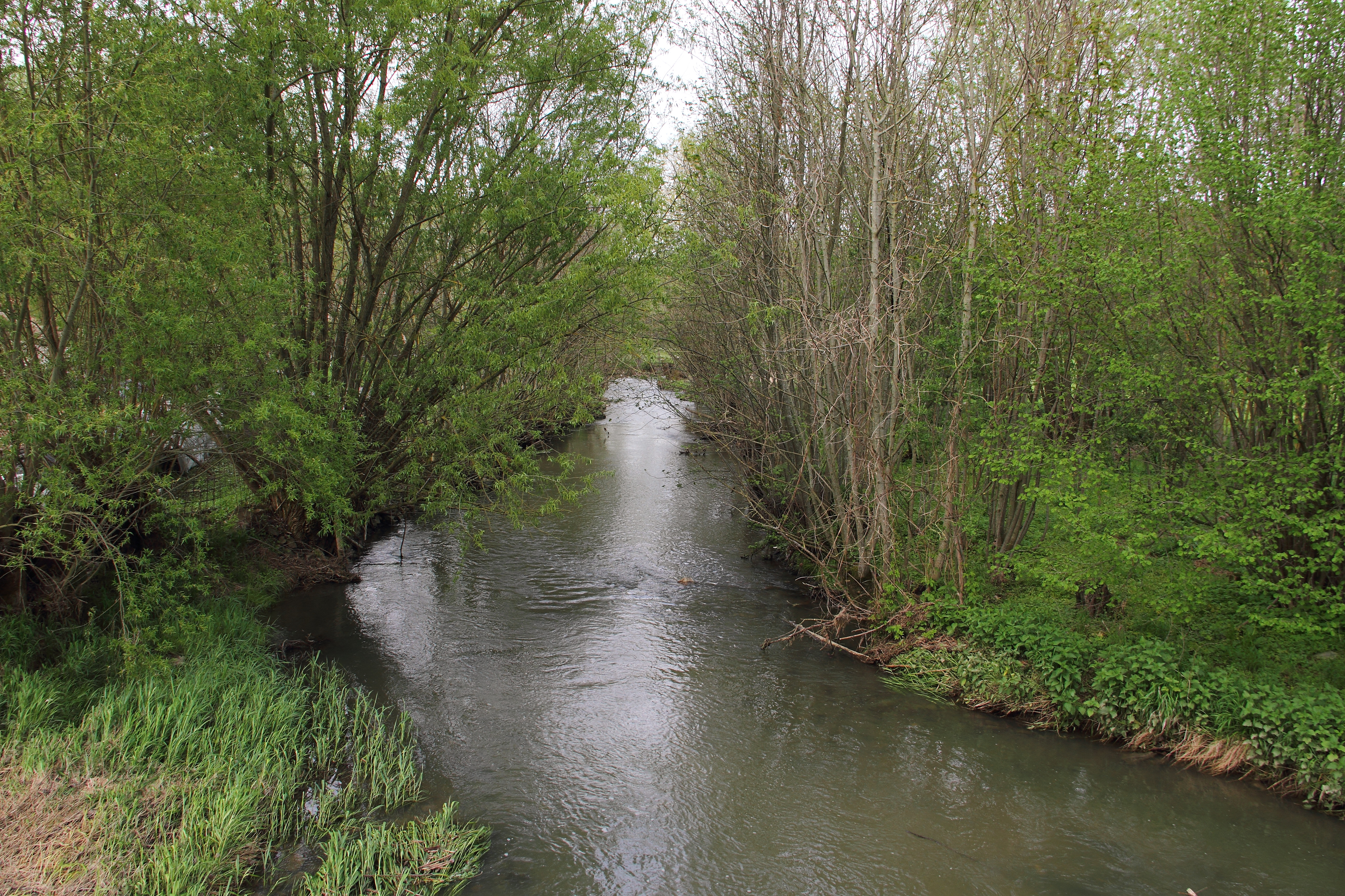 Die Vorbach beim Weikersheimer Ortsteil Haagen im FFH-Gebiet 6625-341.